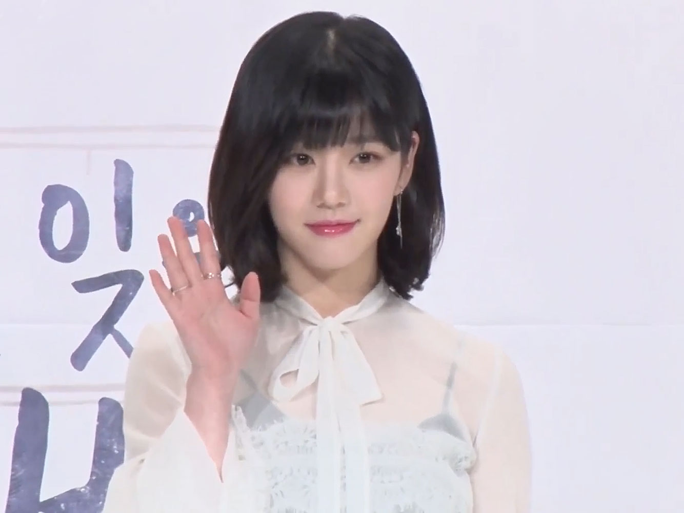 "청순과 섹시"...이유비-이채영, '출구없는 매력' #LeeYu-bi #LeeChaeYoung [디패짤]